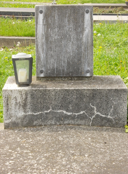 Wiener Zentralfriedhof-Max von Millenkovich